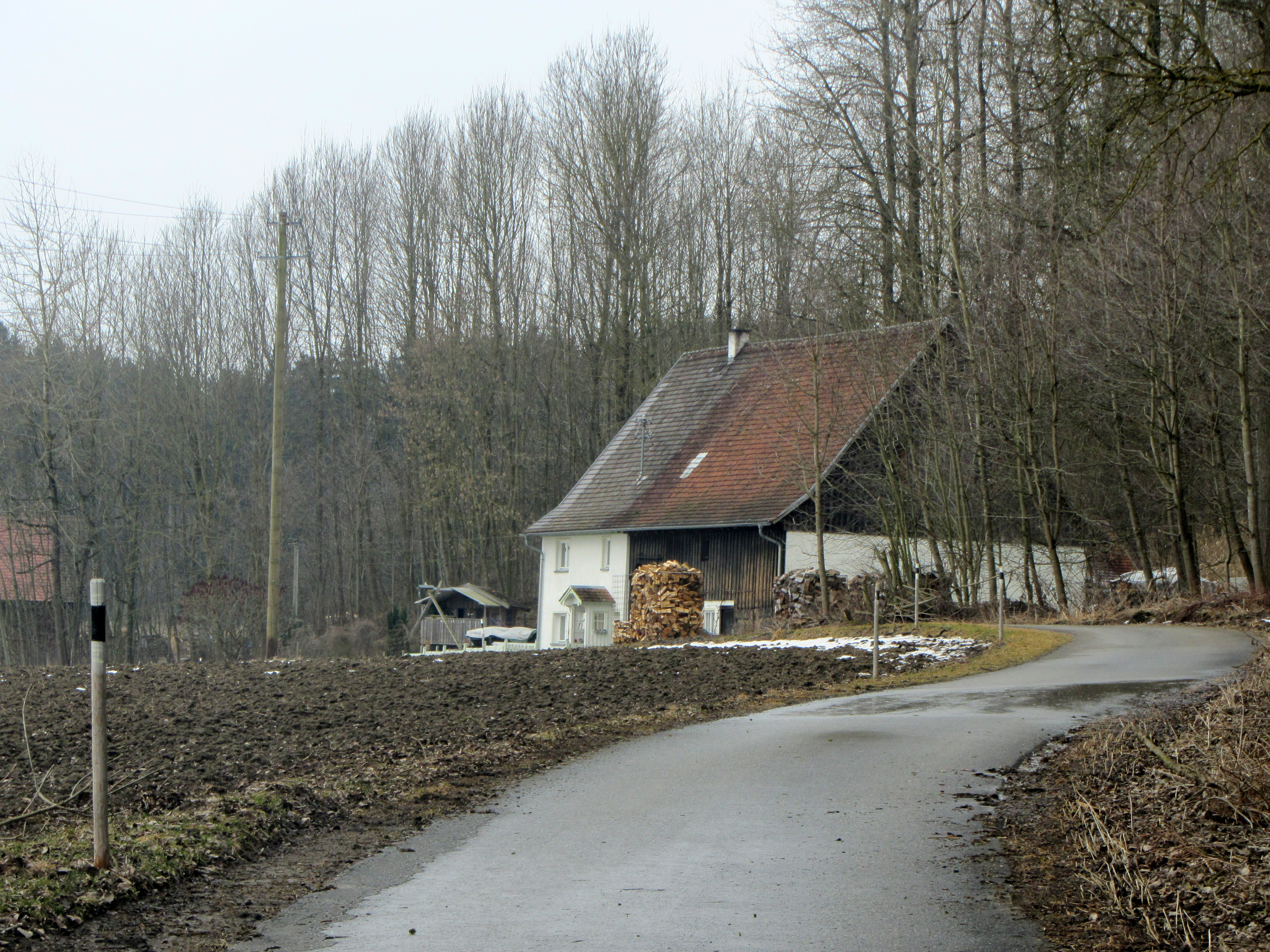 Jägerhaus (Tannheim)